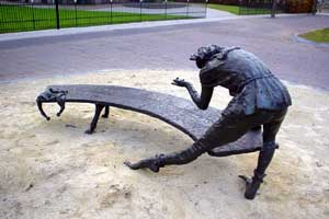 Sculptuur Tijl Uilenspiegel in Lierderholthuis